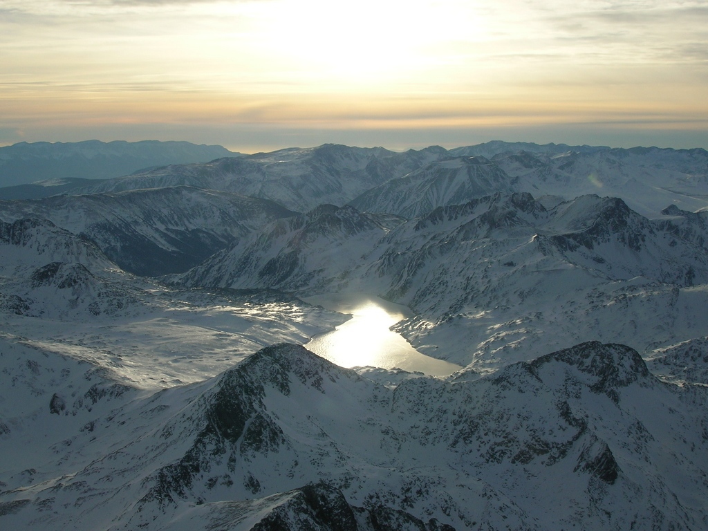 Template:Lac du Lanoux